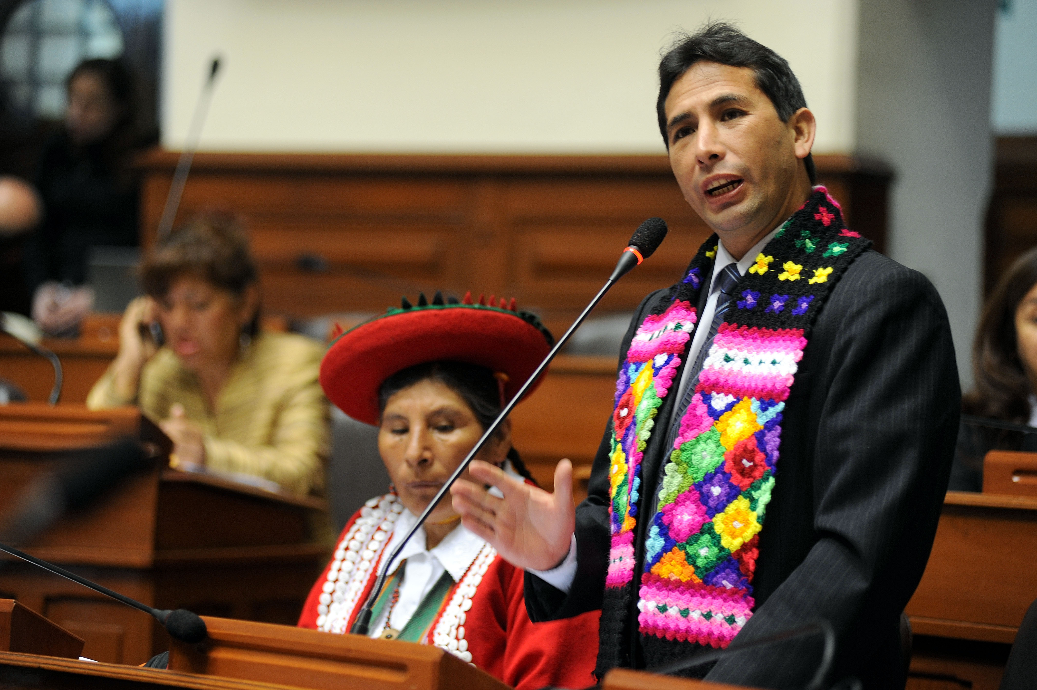 El legislador Miro Ruíz fija su posición en el debate parlamentario realizado esta tarde por el Pleno.